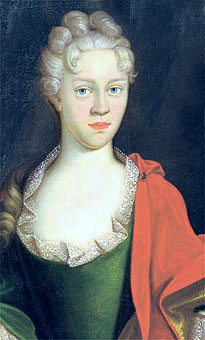 Erdmuthe Dorothea von Zinzendorf, née Countess Reuß zu Ebersdorf (* 7. November 1700; † 19. Juni 1756)